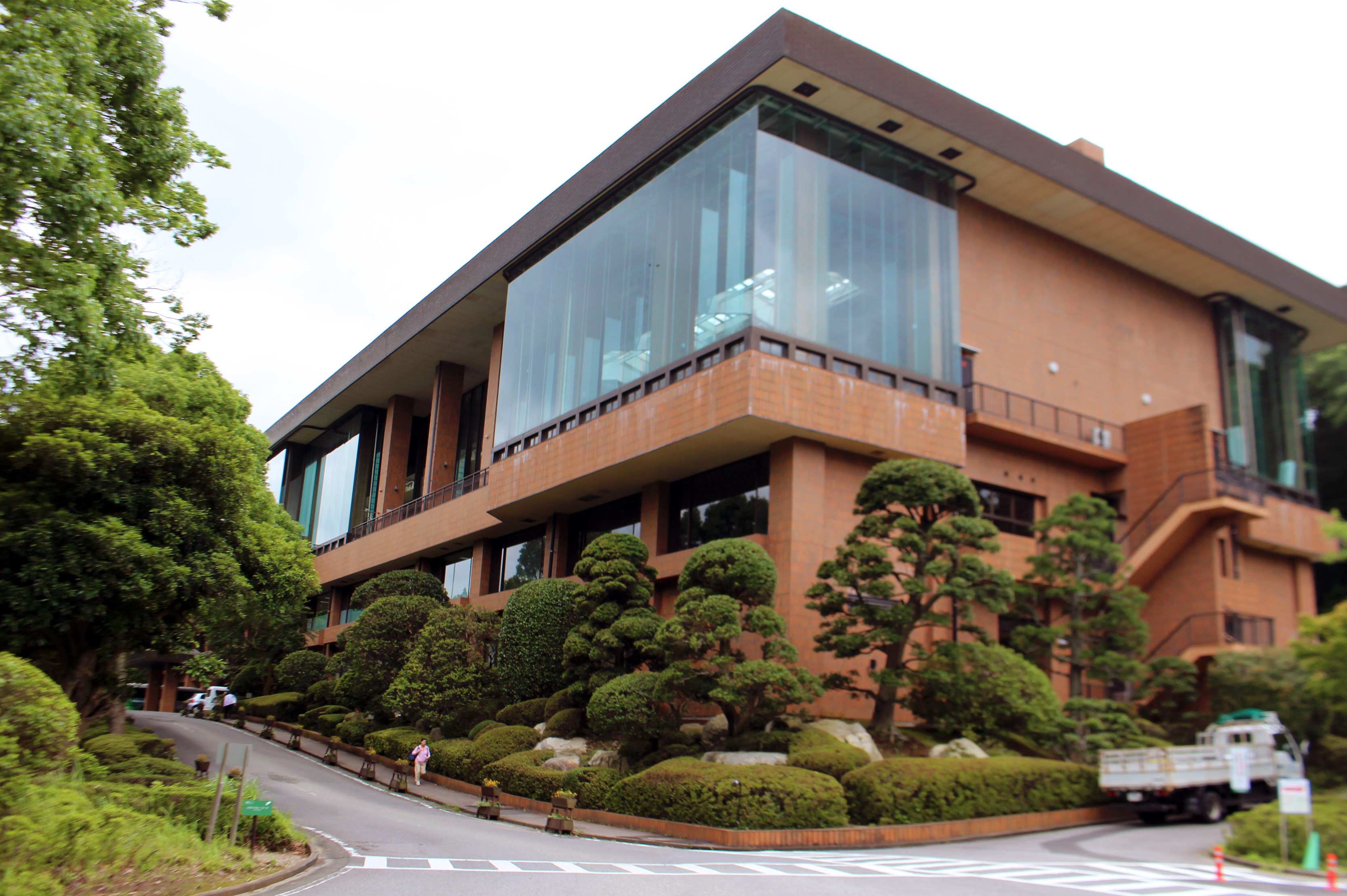 日本メディカルトレーニングセンター（リソル生命の森内）